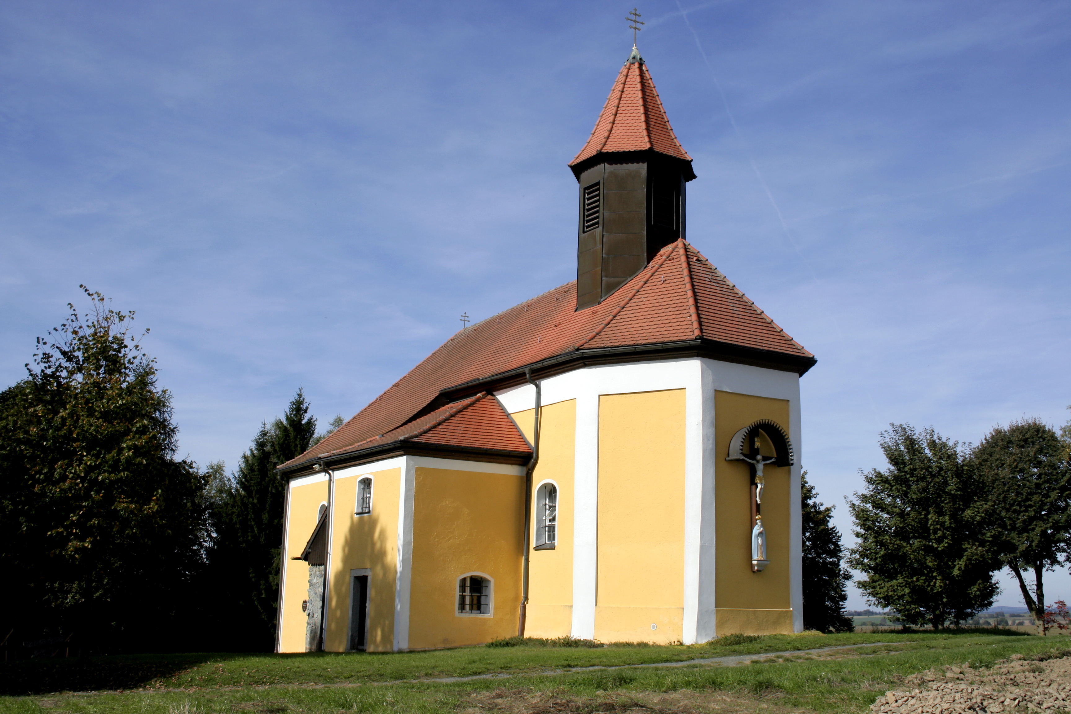 Baudenkmal Deutschland; Bayern; Oberpfalz; Neustadt a.d.Waldnaab; Vohenstrauß; Oberlind; Kalvarienberg; Kath. Wallfahrtskirche Unserer Lieben Frau, Saalkirche mit Walmdach und eingezogenem, fünfseitig geschlossenem Chor, Dachreiter mit Spitzhelm, 1755; mit Ausstattung; (D-3-74-162-87)This is a photograph of an architectural monument.